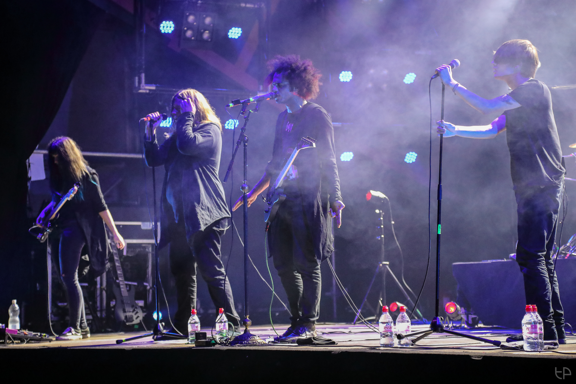 4L8A3217_web